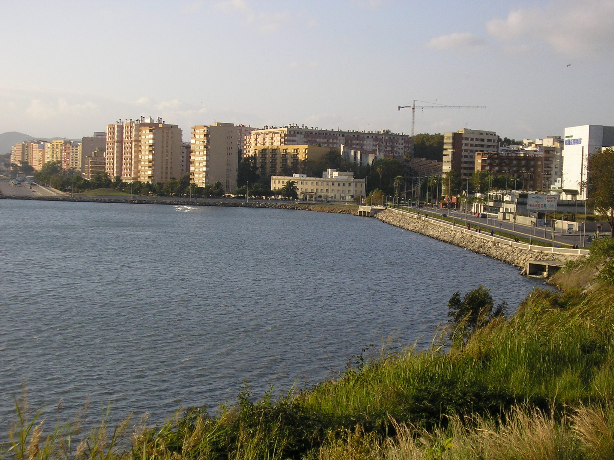 Playa de los Ladrillos de Algeciras Fotografía de realización propia, noviembre de 2007